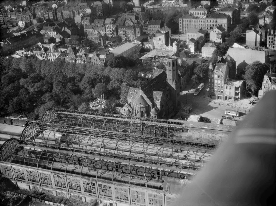 Blick über den Hauptbahnhof auf die Ruine der St. Jürgenkirche.